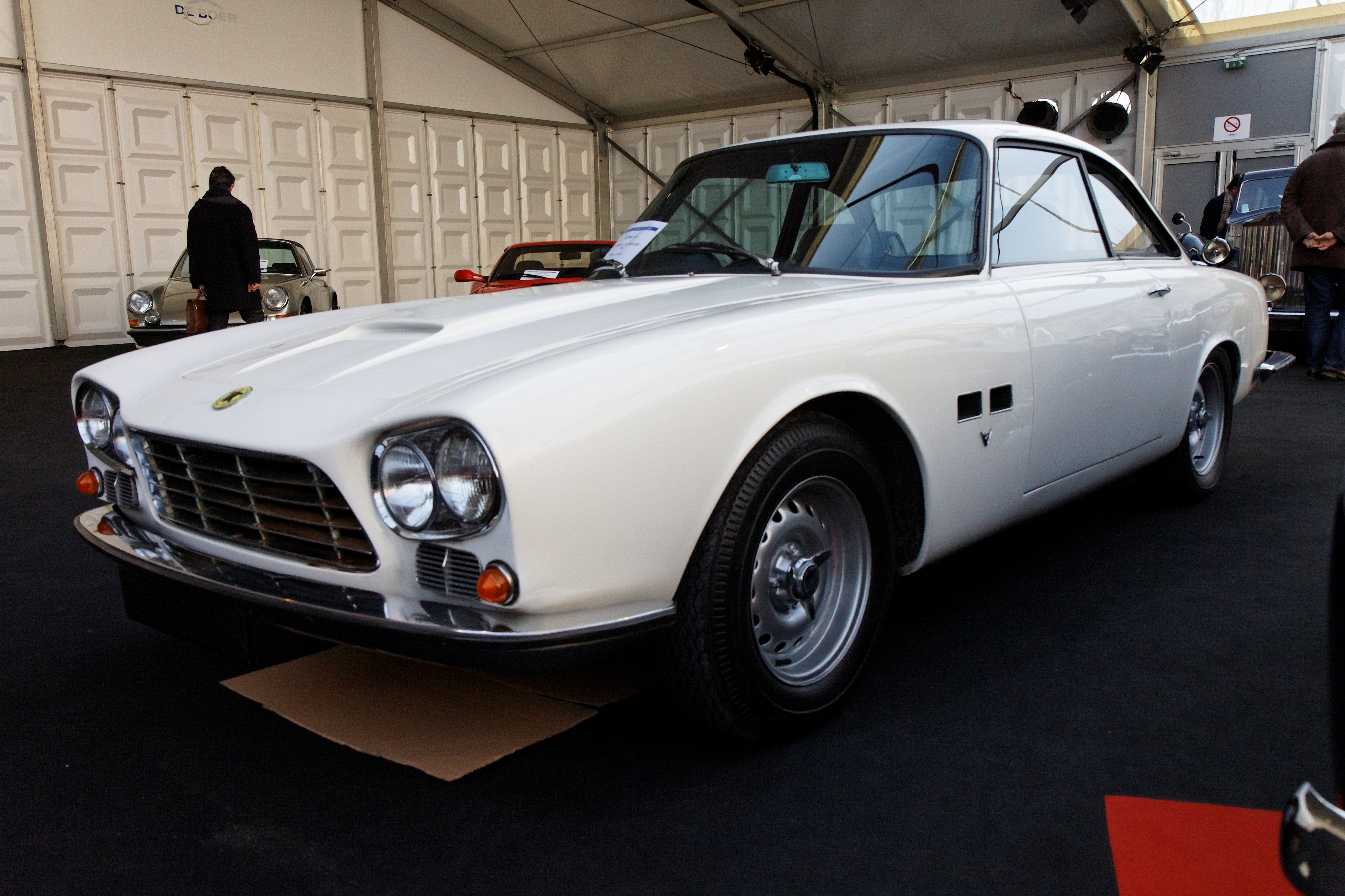 Gordon-Keeble Coupé Bertone - Festival Automobile International 2011 - Vente aux enchères